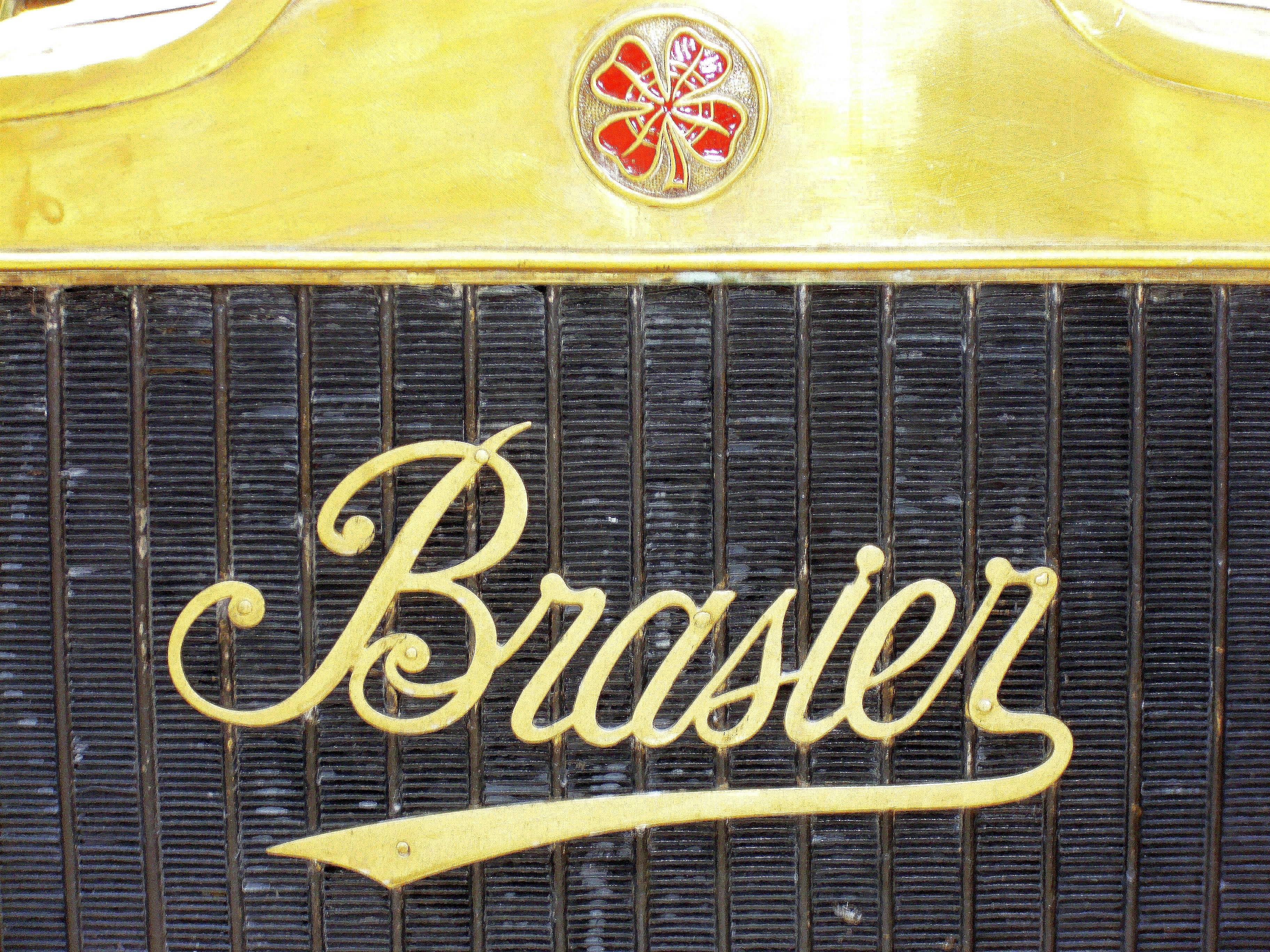 Emblem Brasier